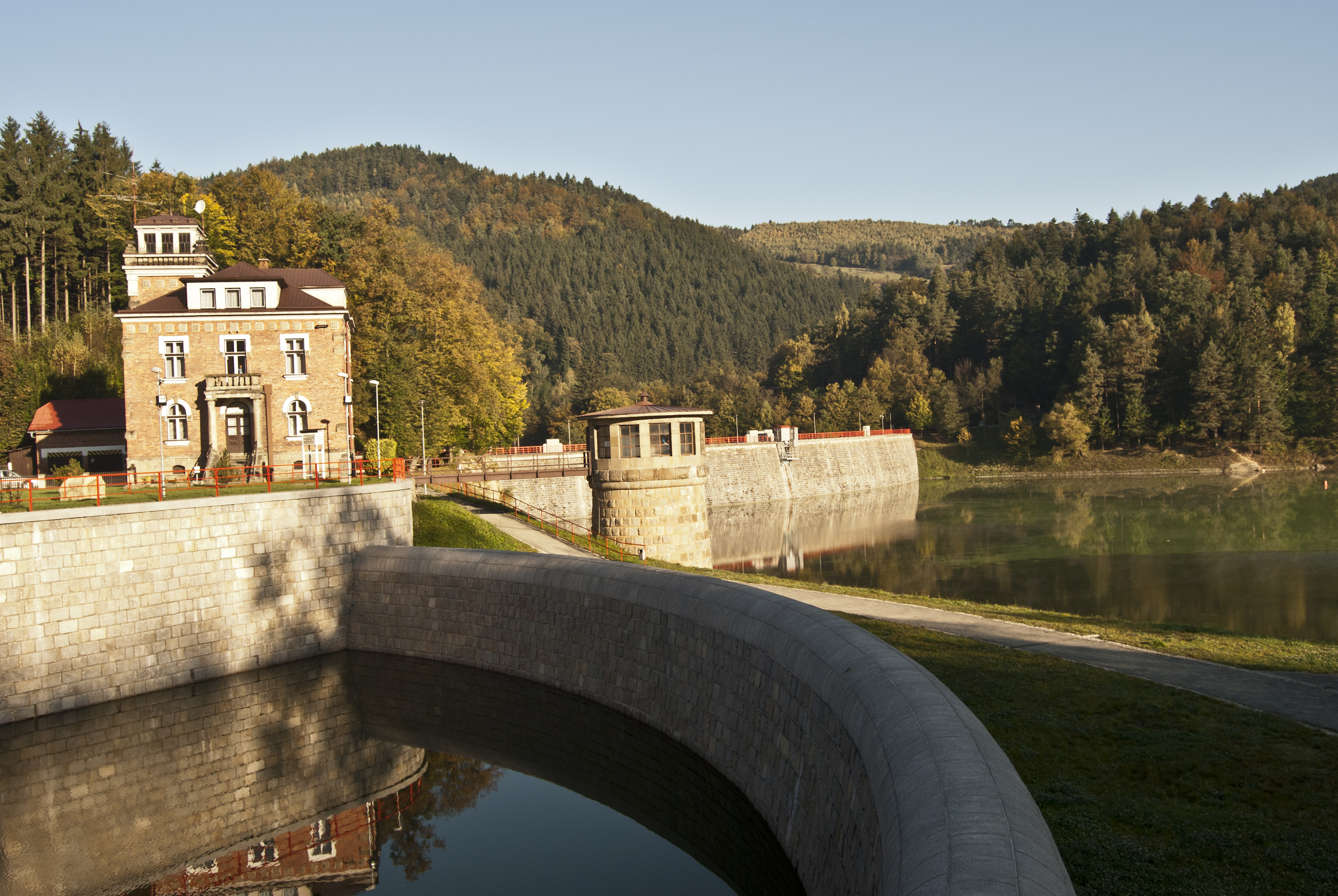 Přehrada Bystřička, s omezením: bez kaskádovévo přelivu, zklidňovací nádrže, dvou mostů přes kaskádový přeliv a pozemku parc. č. 866/1 (Bystřička), Bystřička